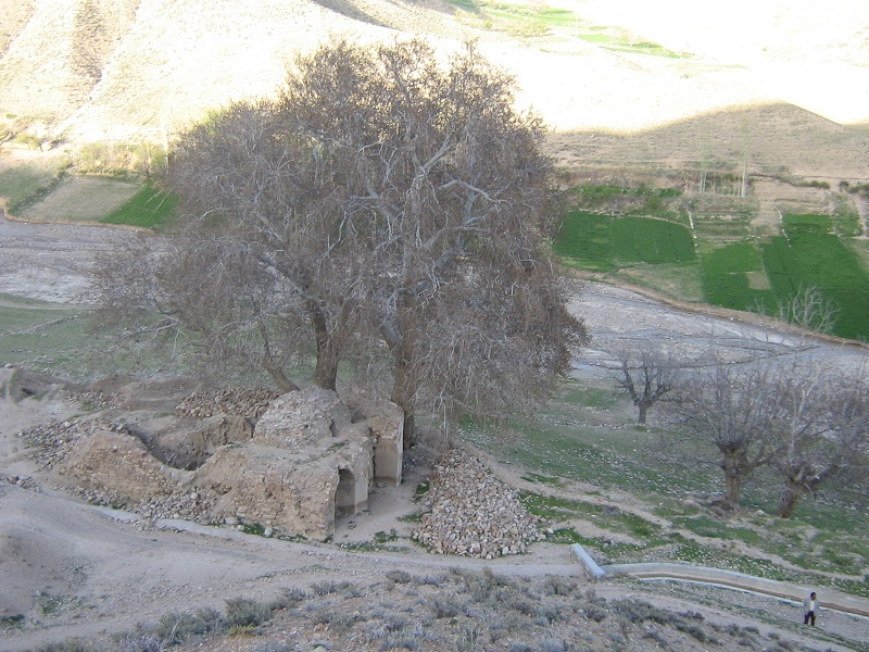 دورنمایی از امامزاده روستای جهان اسفراین اسفراین-احمد نیک گفتار